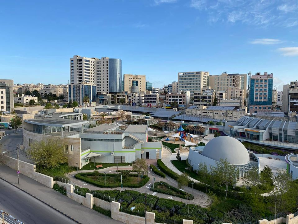 لقطة علوية لمركز هيا الثقافي في عمّان